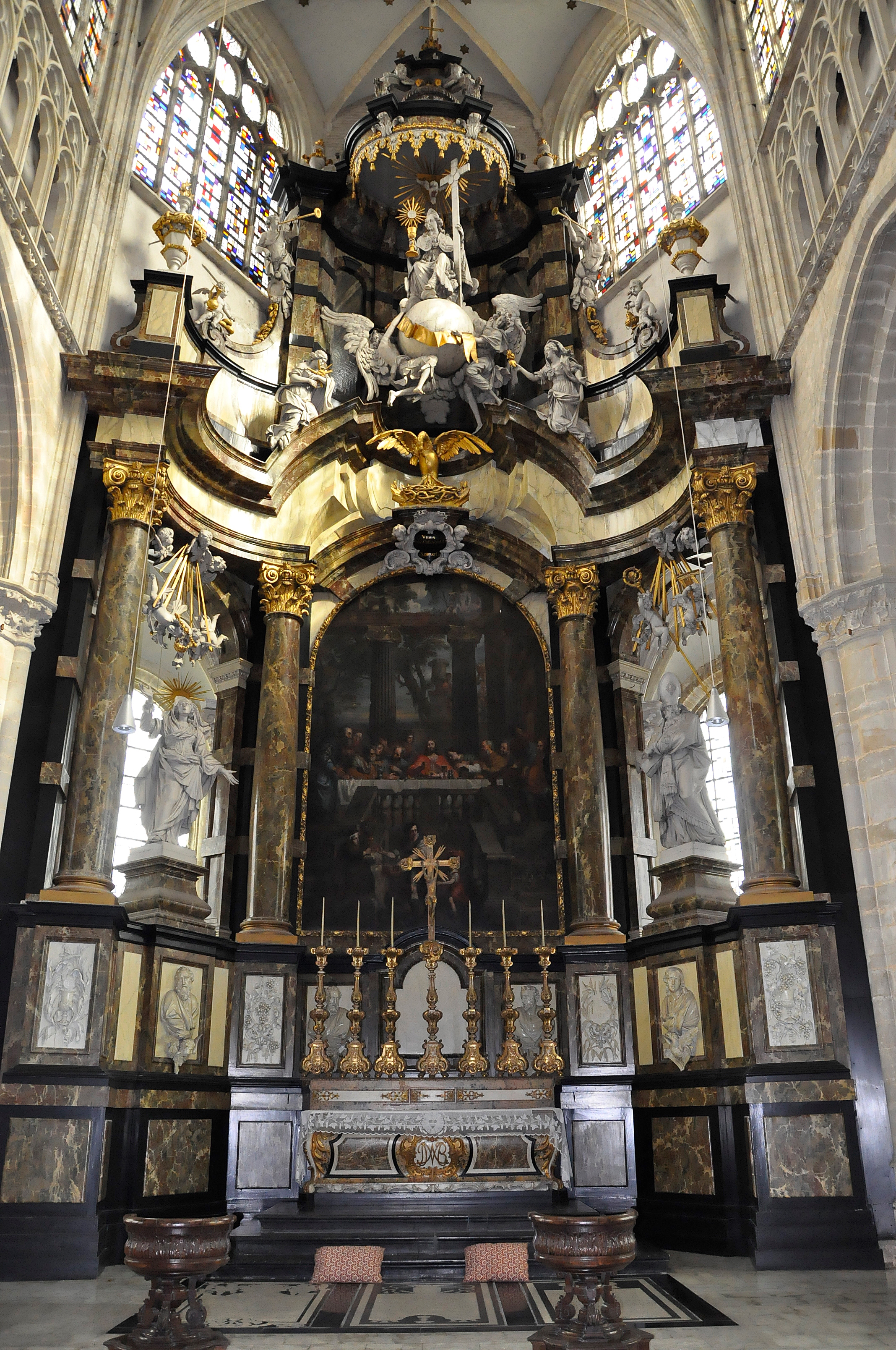 Onze-Lieve-vrouw-over-de-Dijlekerk te Mechelen (België)